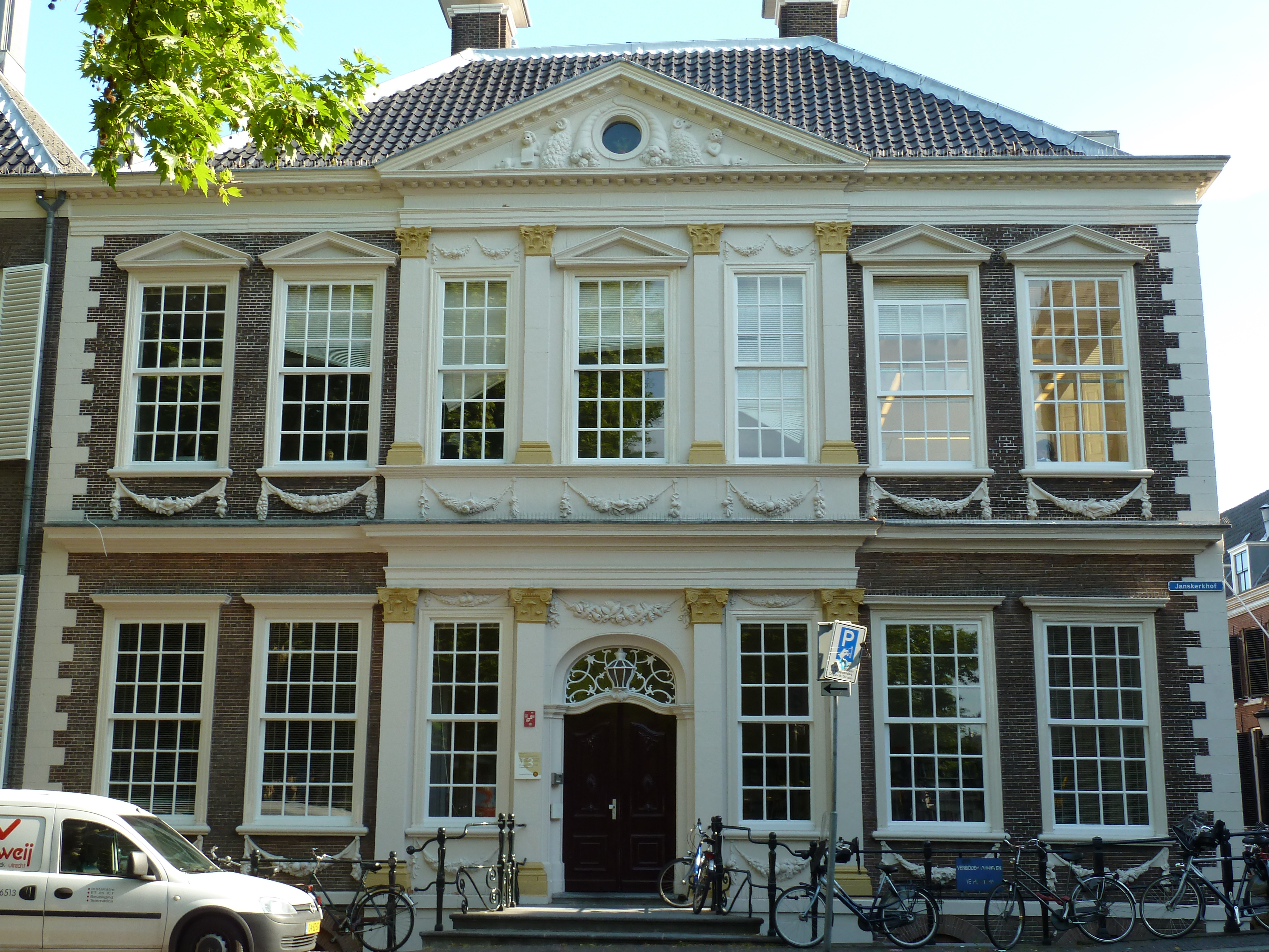 Janskerkhof 13, Utrecht, NL. Rijksmonument